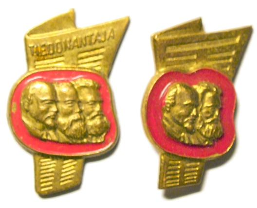 Tiedonantajan rintamerkki. Merkissä oli alun perin Leninin, Marxin ja Engelsin kuvat, mutta 1970-luvulla Engels poistettiin siitä.